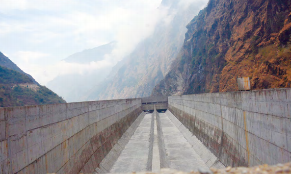 नेपाली: बालुवा थिग्र्याउने पोखरी